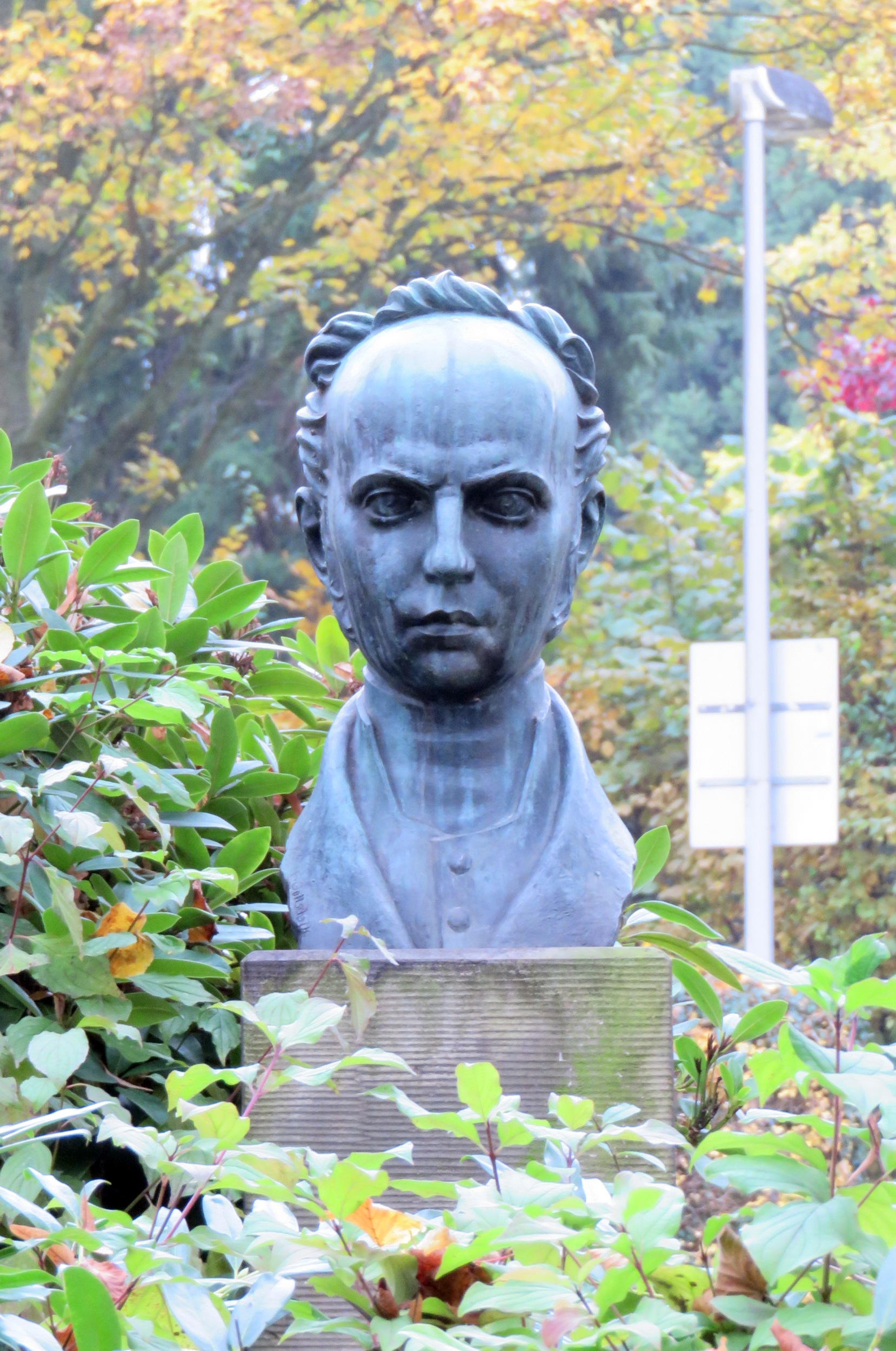 Büste Christian Dietrich Grabbes am Grabbe-Gymnasium in Detmold